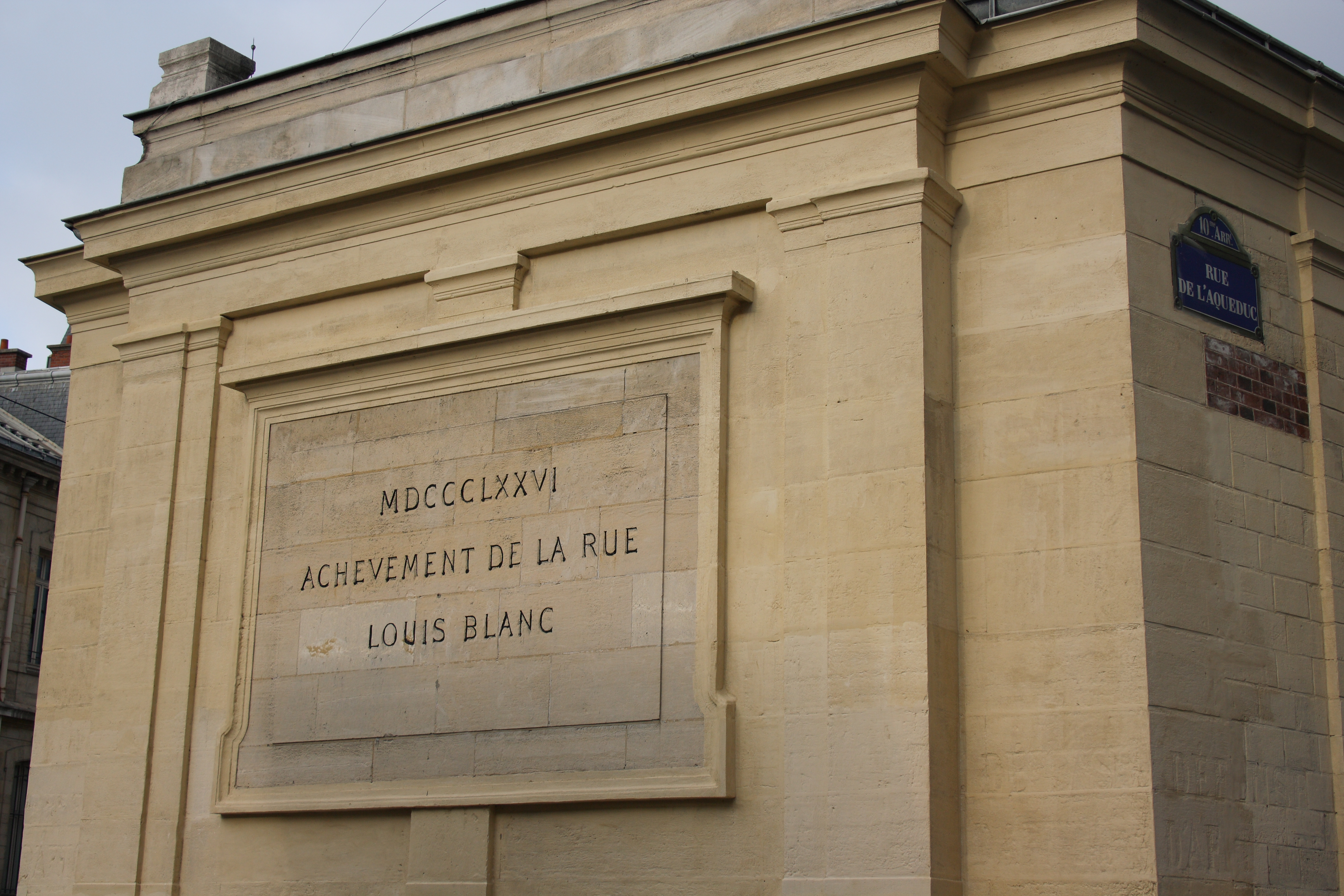 Straßenschild in Paris (10. Arrondissement), Rue Louis-Blanc